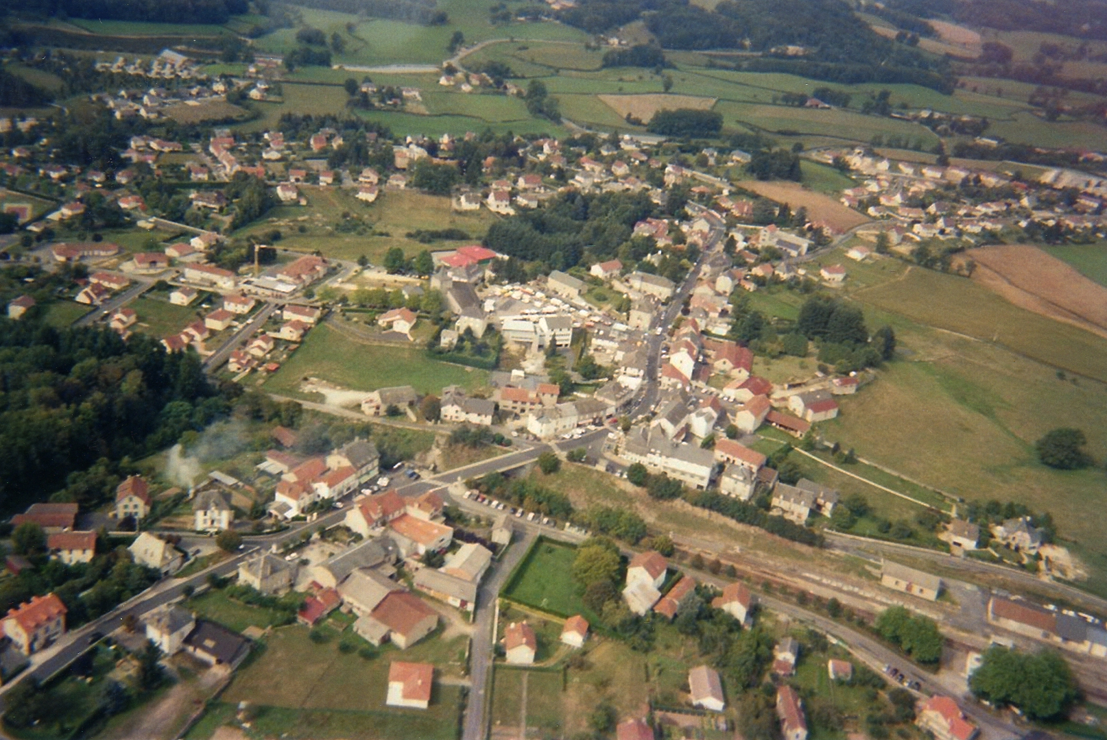 Vue aérienne du Rouget